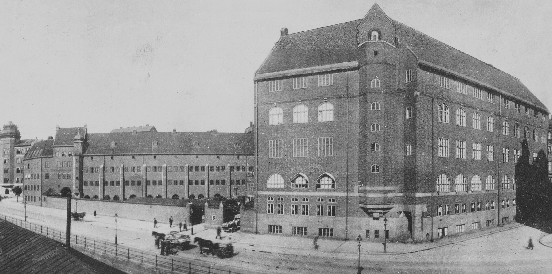 Mjölkcentralen (ursprungligen Mjölkbolaget) vid Torsgatan 12-20 (kvarteret Läkaren). Byggnadsår 1914. Arkitekt Axel Sjögren